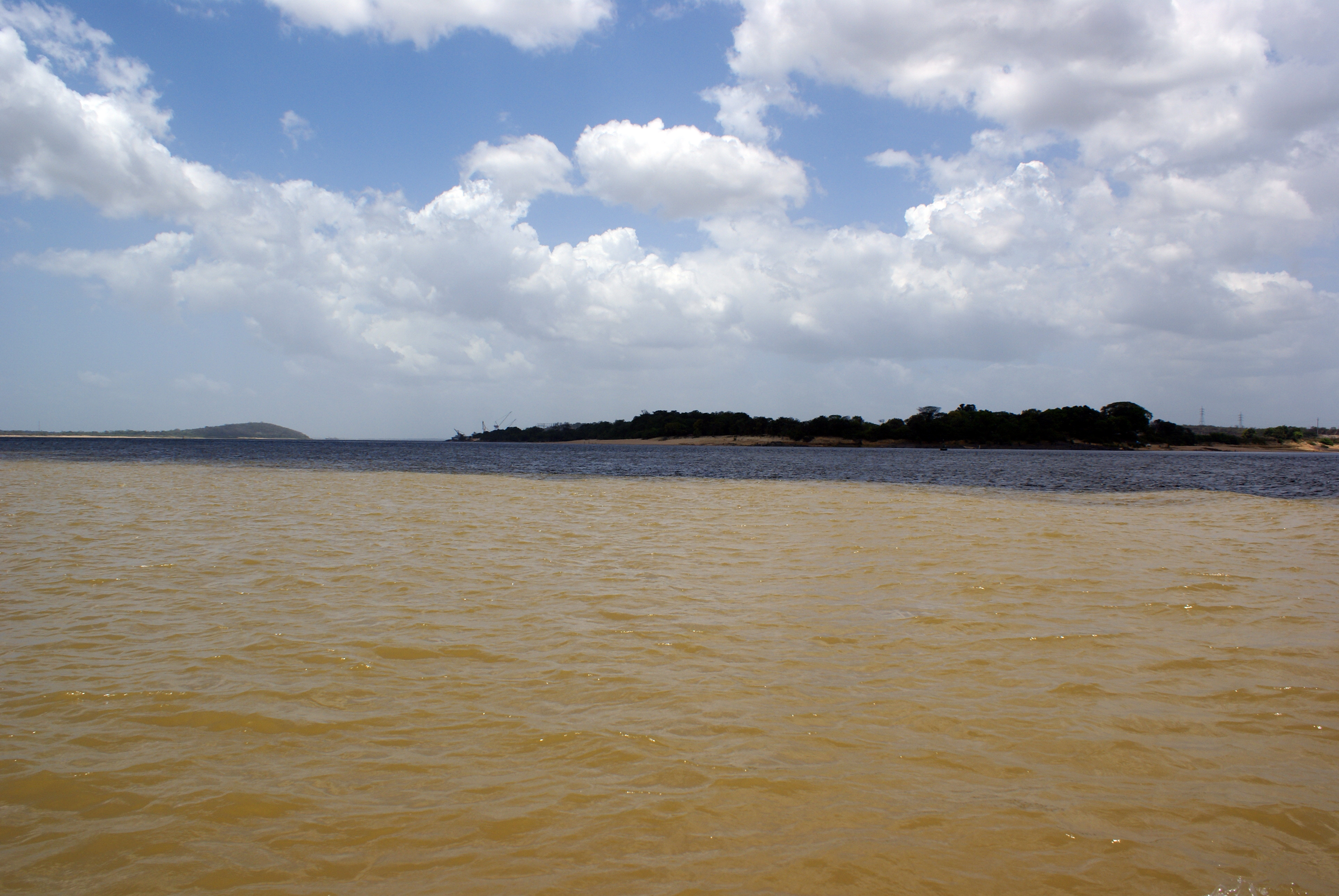 Vista de la unión de las Aguas de los ríos Caroni y Orinoco